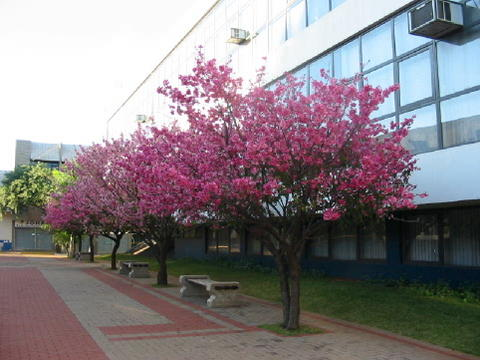 Foto de Flor Cerejeira (Sakura em Japones) Takashina